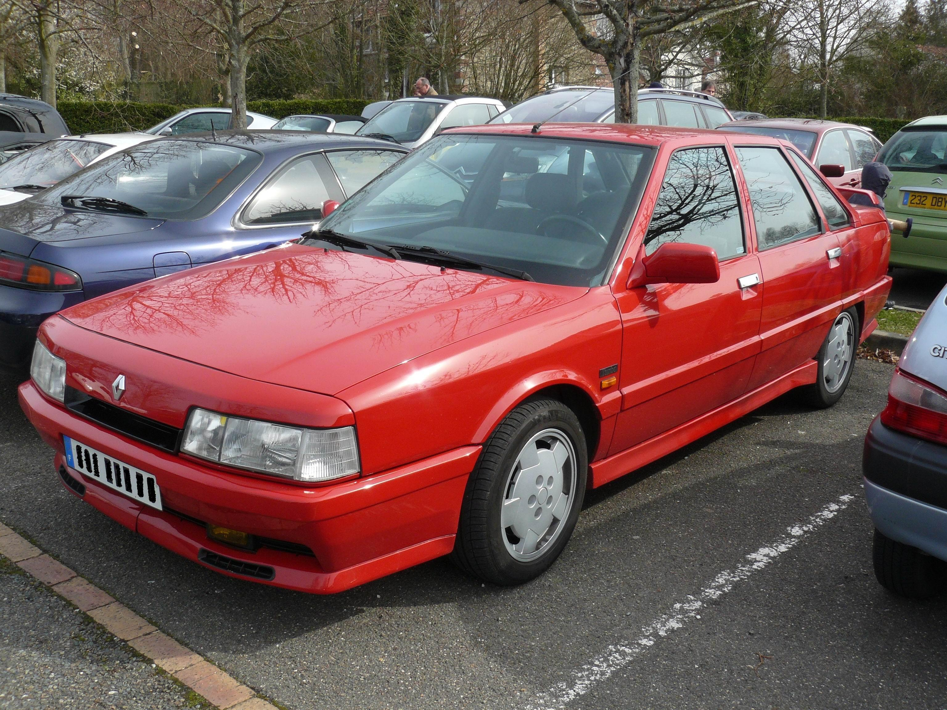 Bailly 2011